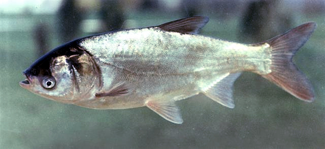 Hypophthalmichthys molitrix photographed in Hungary.